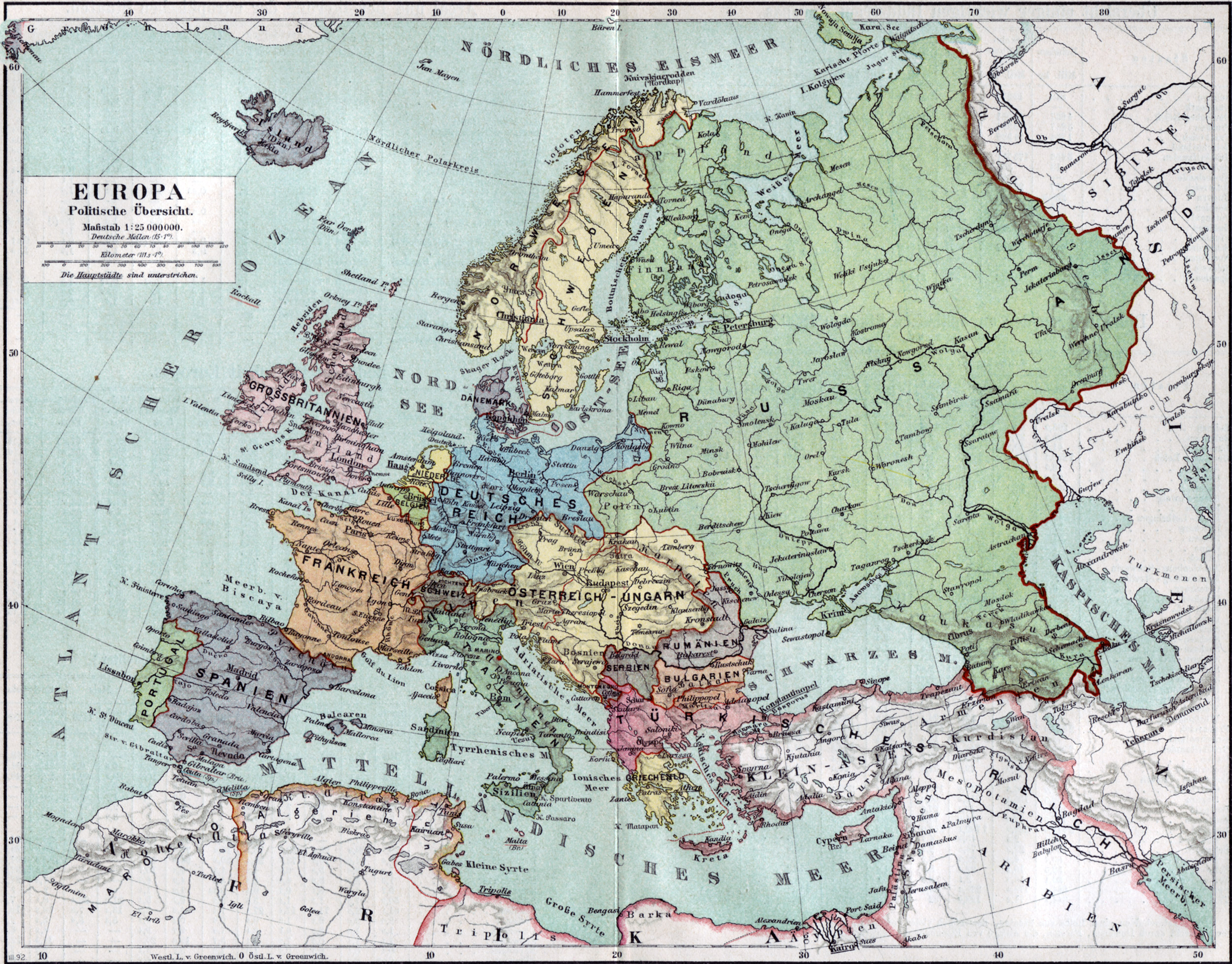 Politische Karte Europas ca. 1890